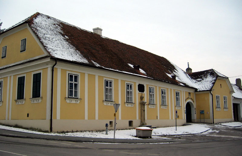 town-museum (Rindsmaullsches Gutshaus) in Pinkafeld, Burgenland, Austria